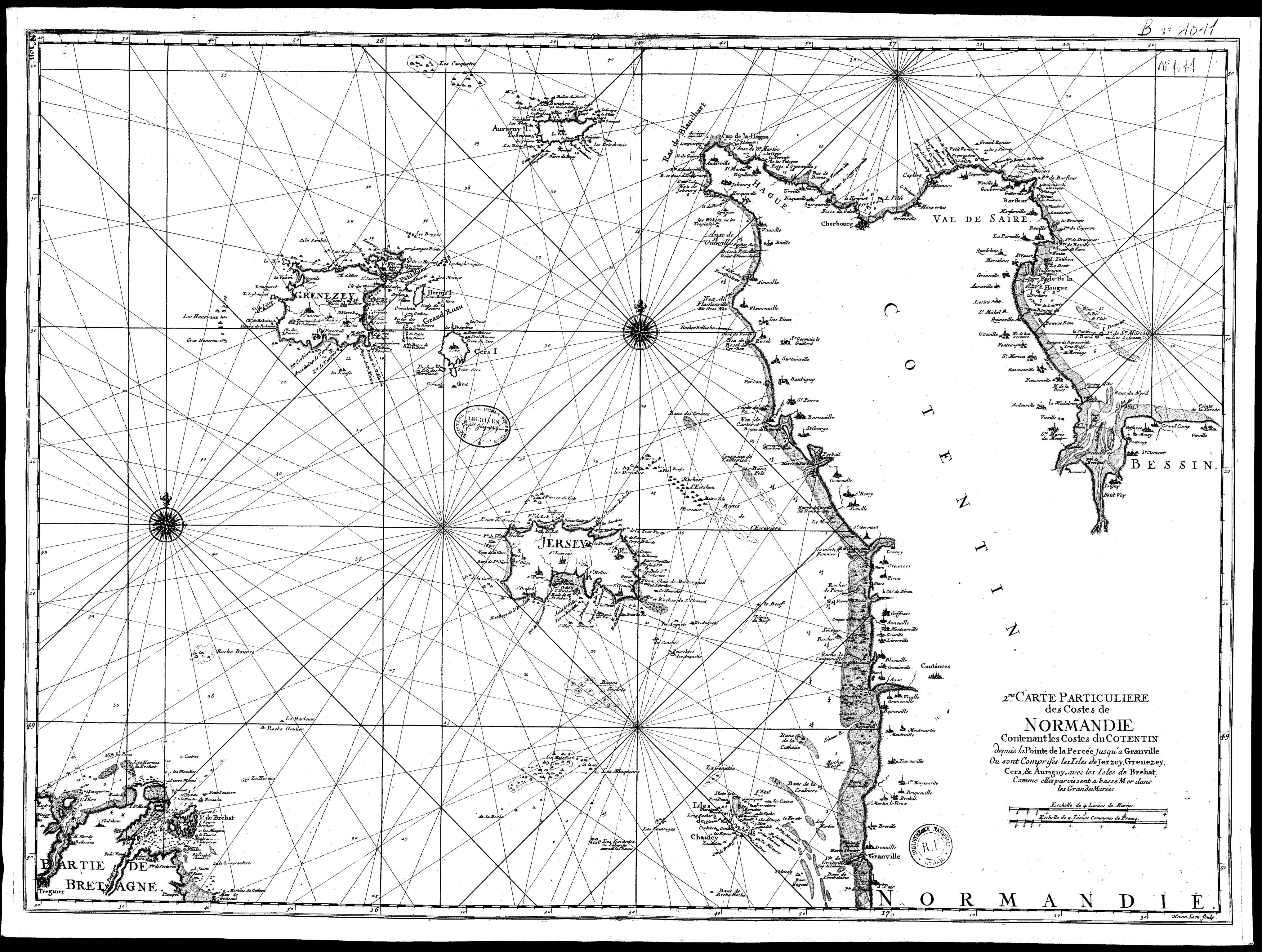 Carte particulière des côtes de Normandie - partie des Côtes-d'Armor, partie de la Basse-Normandie (dont les îles Chausey et la Manche), et des bailliages de Jersey et de Guernesey (dont Sercq et Auregny)